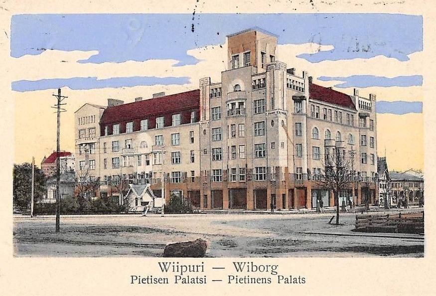 Дворец Пиетинена на дореволюционной выборгской почтовой открытке